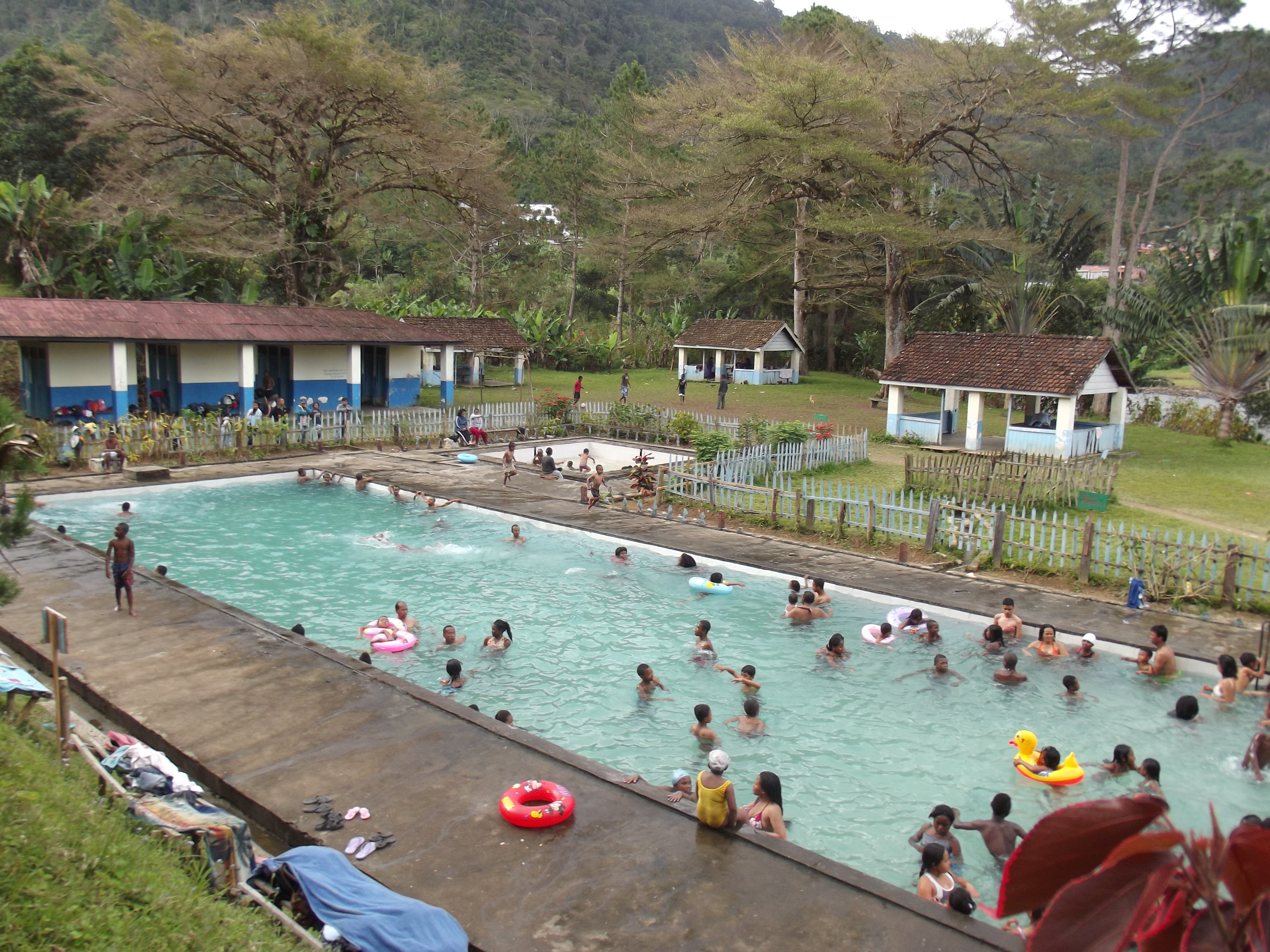 openbaar zwembad bij Ranomafana dorp